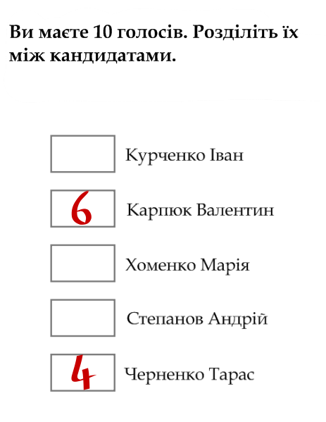 Виборча система